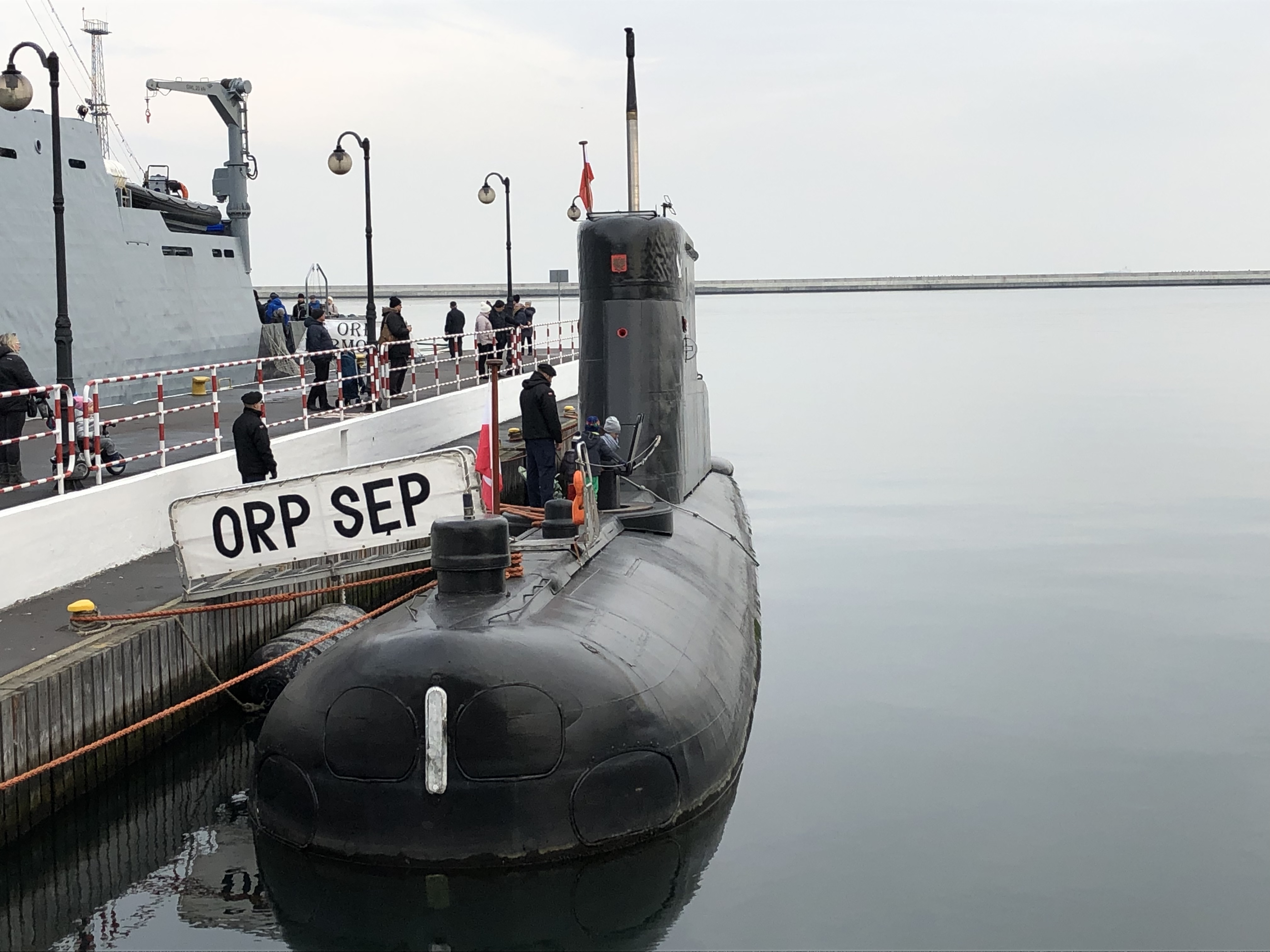 ORP Sęp przy kei na Molo Południowym w Gdyni podczas pikniku marynarskiego z okazji stulecia Marynarki Wojennej, listopad 2018 rok